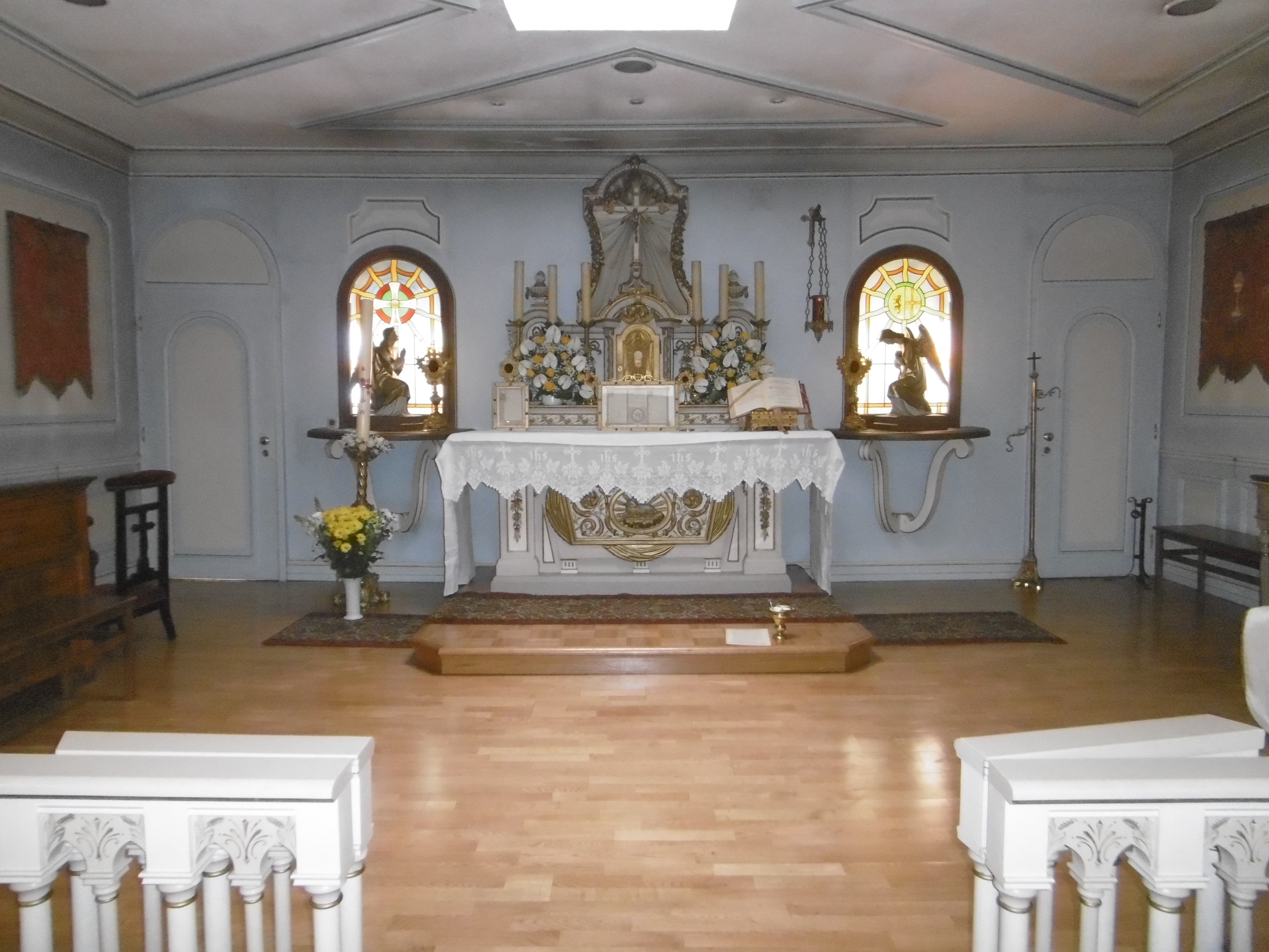 Chapelle Notre-Dame du Très-Saint-Rosaire